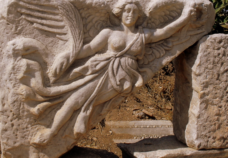 Efez, Nike